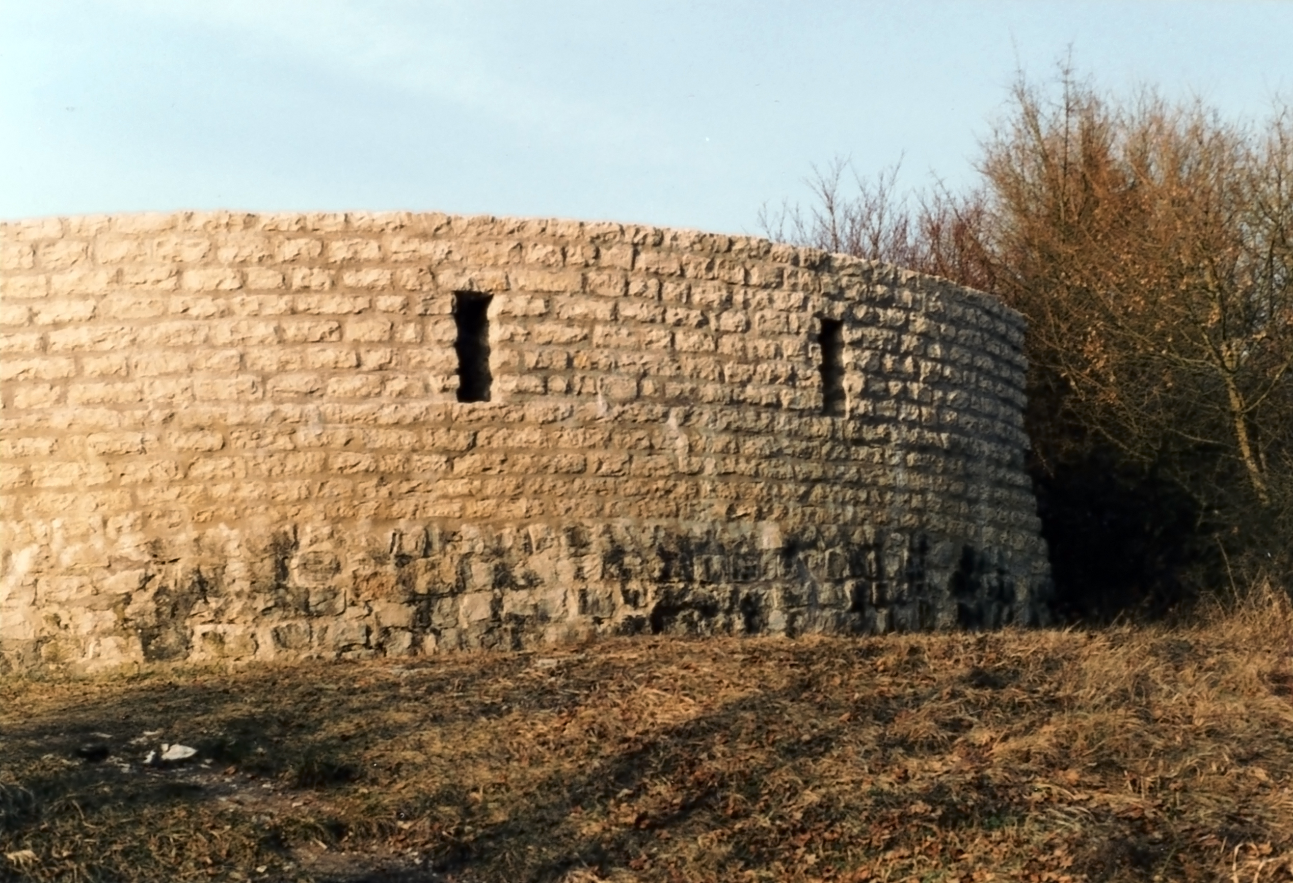 Kastell Pfünz, Bayern; teilrekonstruierte Südostecke. Deutlich erkennbar ist hier der autentisch erhaltene Teil im unteren Drittel der Baustruktur (Zustand 1993).